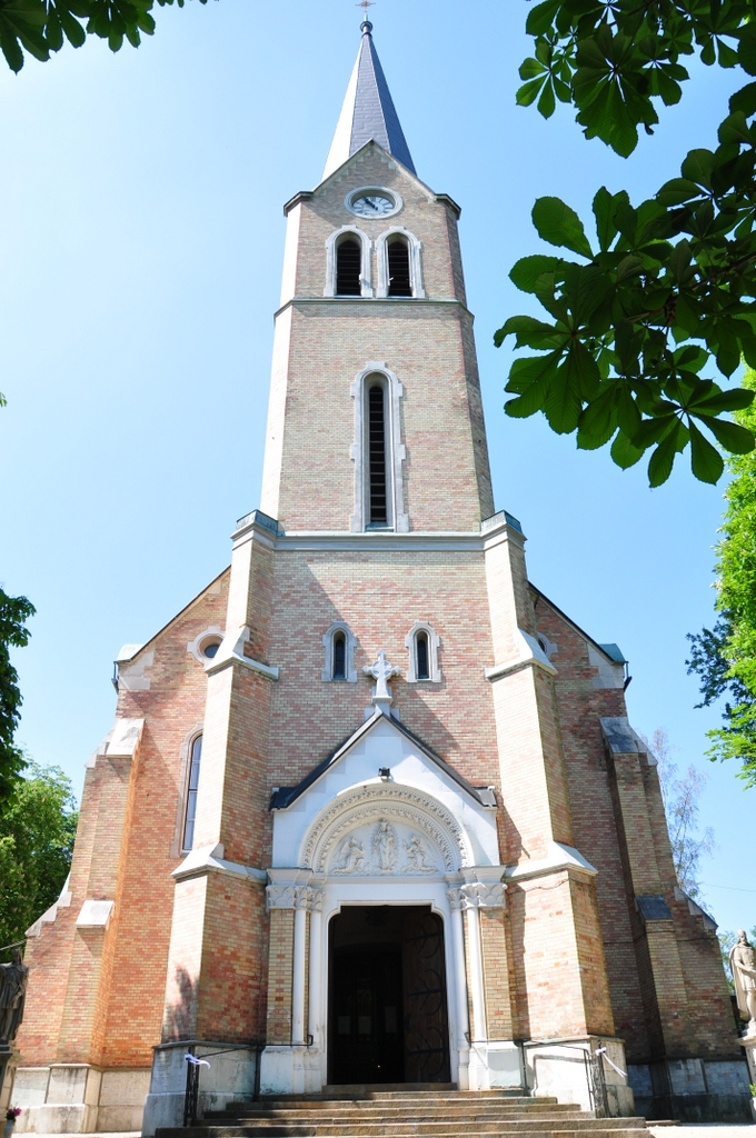 Church of the Nativity of the Virgin Mary in Máriaremete, Budapest, Hungary